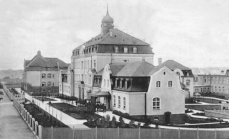 Städtische Krankenanstalten Essen, Vorläufer des Universitätsklinikums Essen